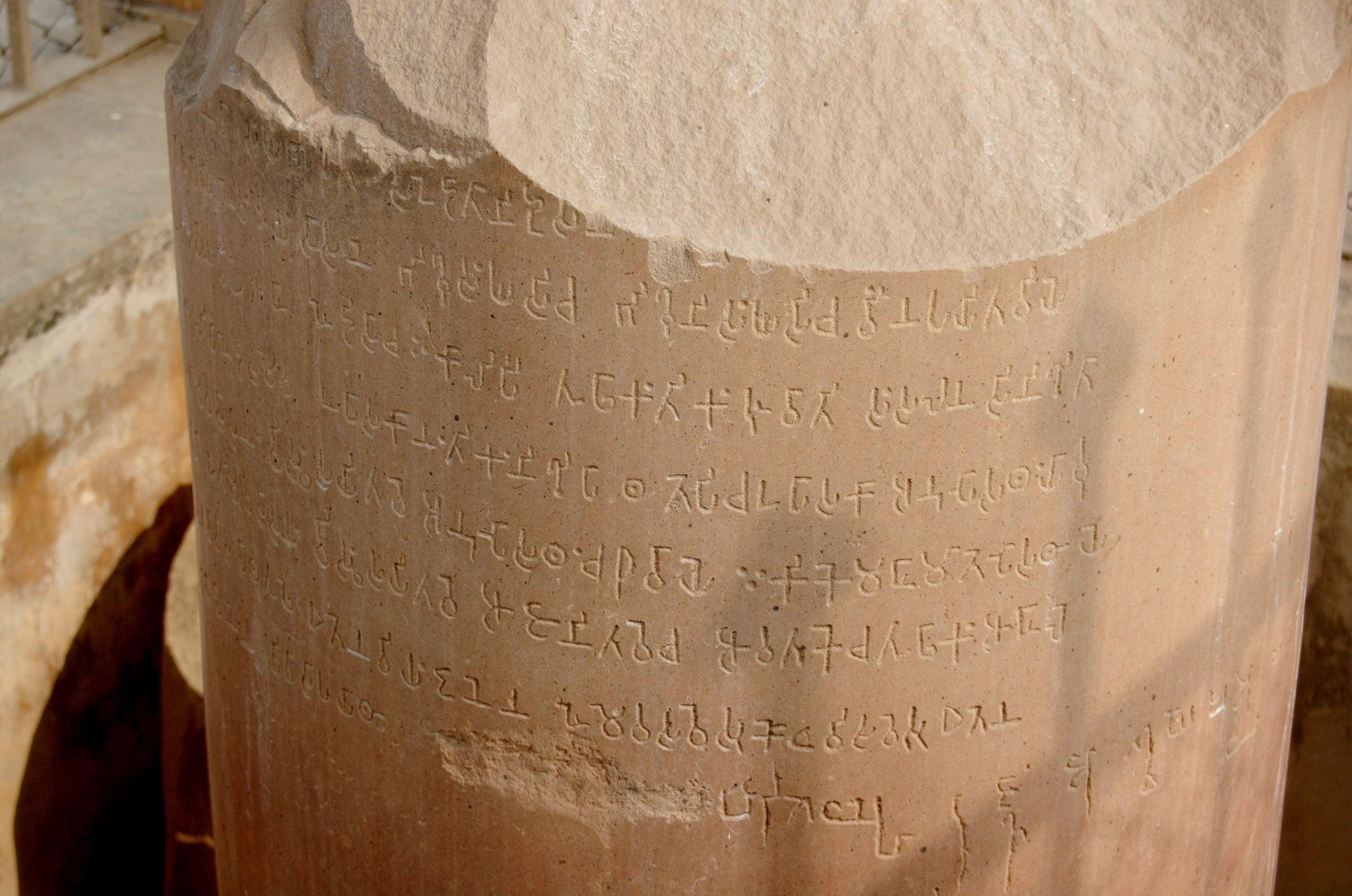 ashoka pillar